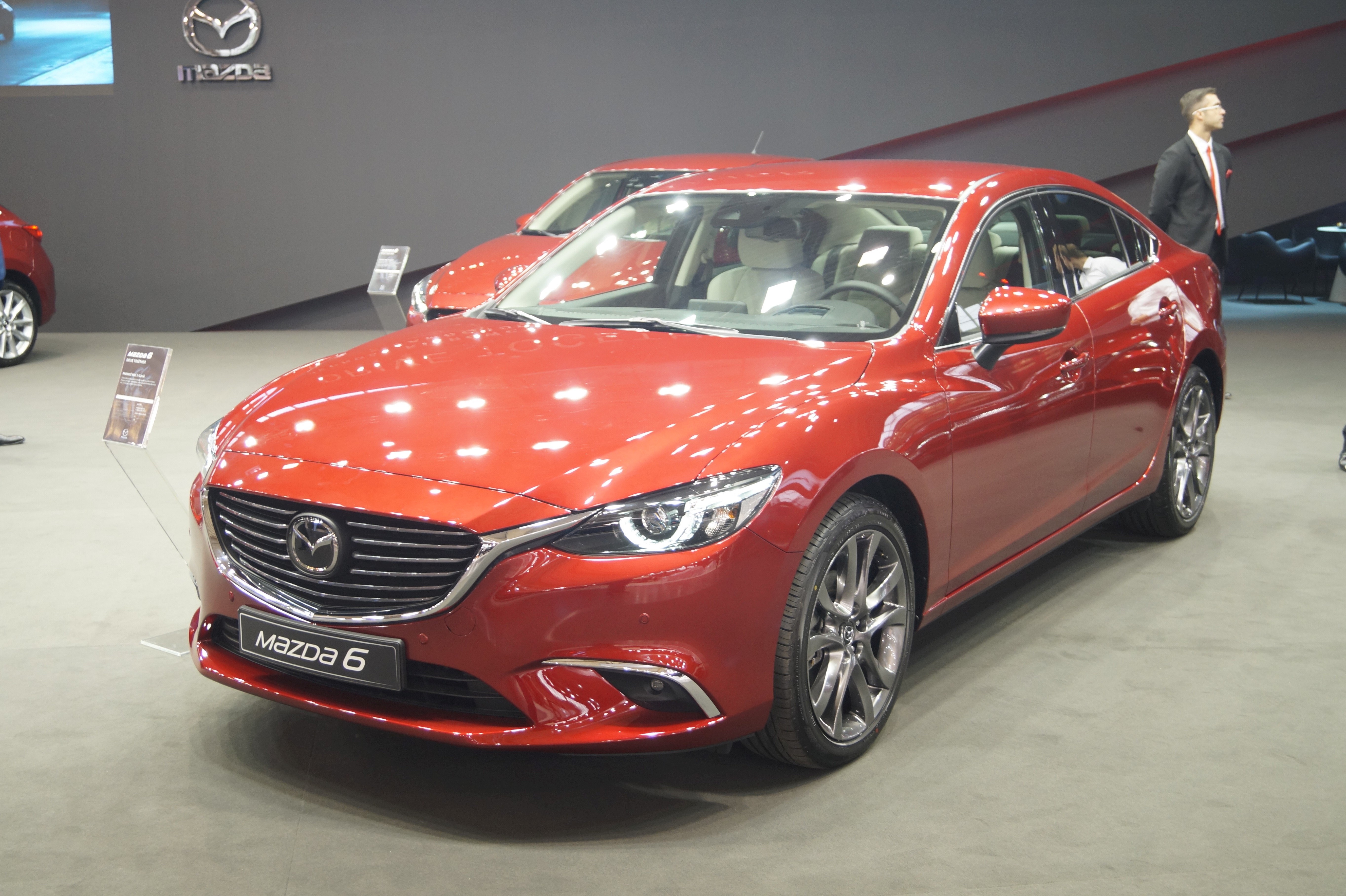 Lewy przód Mazdy6 na Motor Show Poznań 2017.